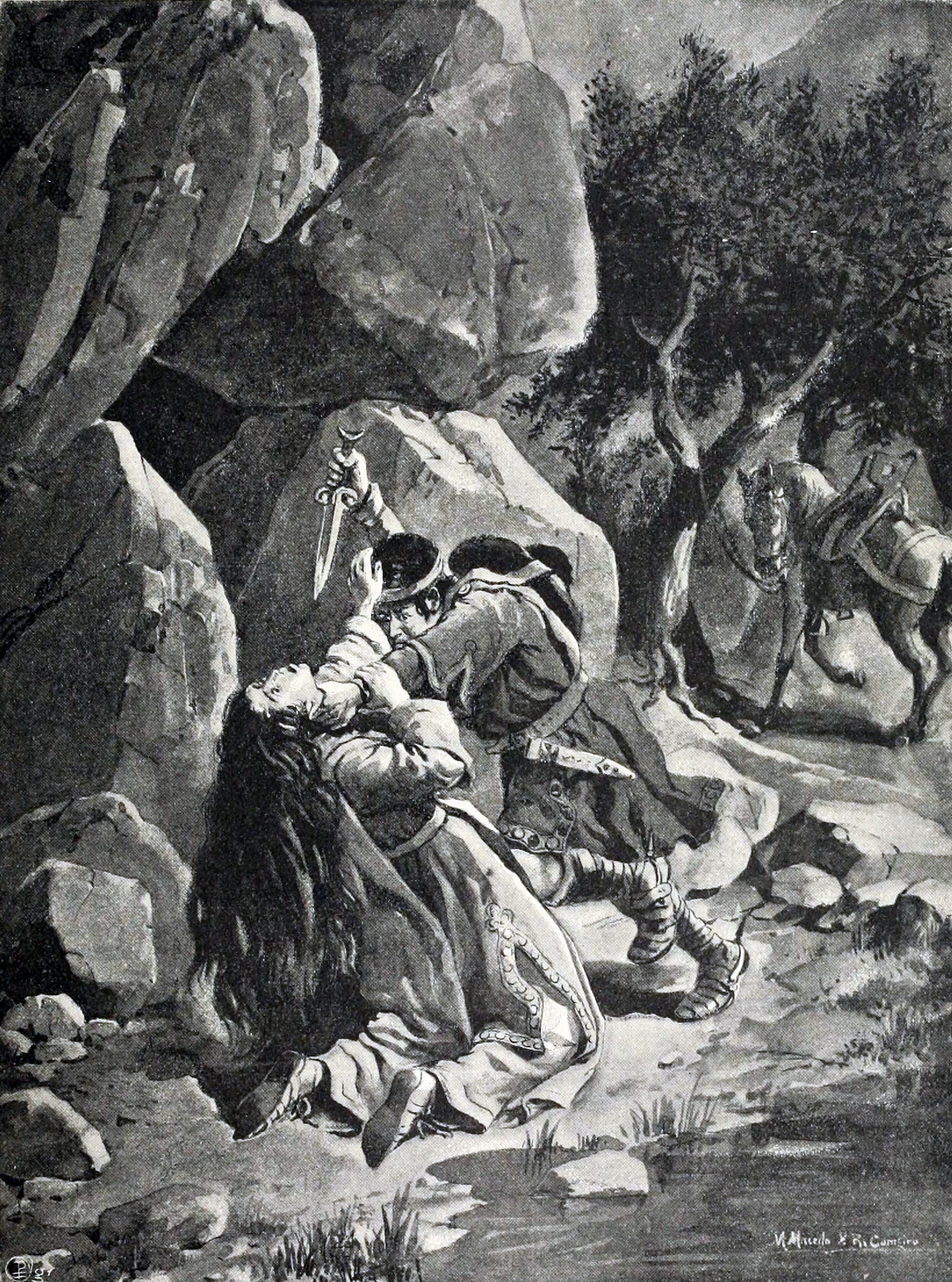 Illustration from Obras completas de Almeida Garrett